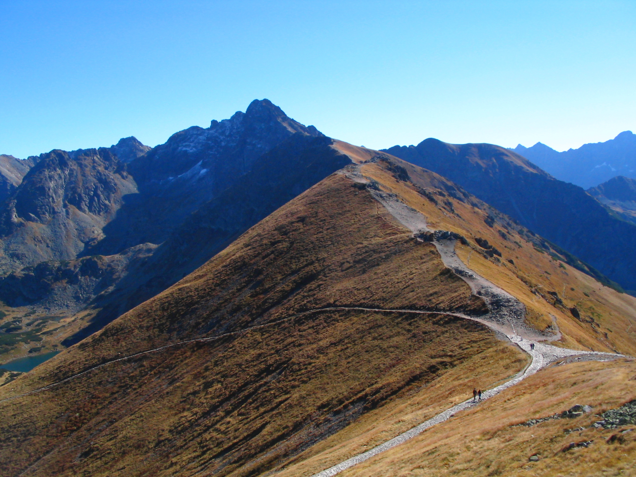 Kuźnice-Kasprowy Wierch-Beskid-Liliowe-Hala Gąsienicowa-Boczań-Kuźnice 9